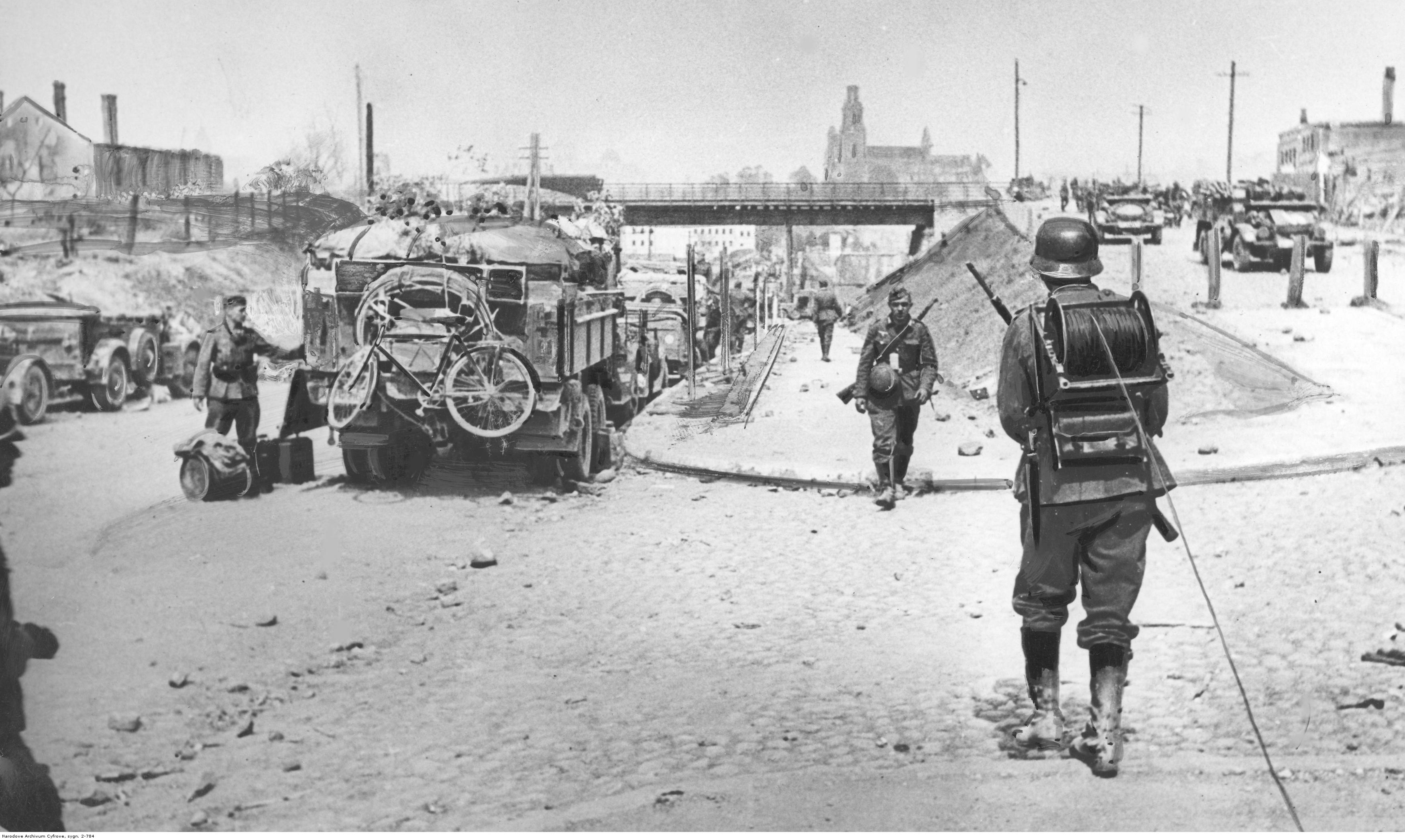 Zajęcie Grodna przez wojska niemieckie. Żołnierze i oddziały zmotoryzowane na ulicach miasta. W tle widoczny kościół Znalezienia Krzyża Św.